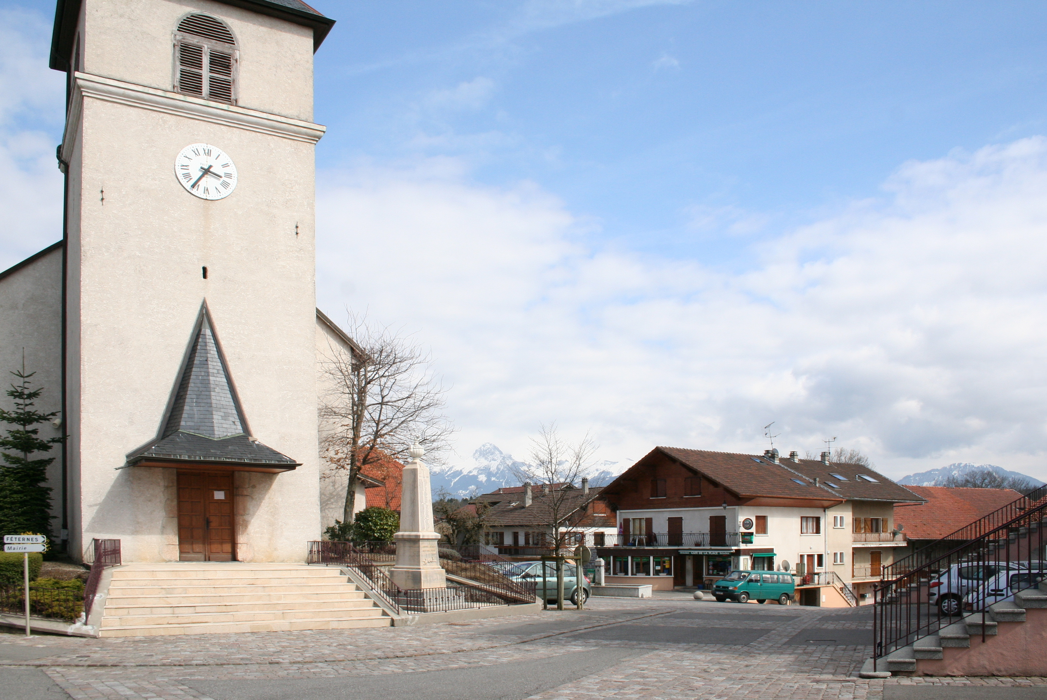 La place de Larringes avec l'église et le bar